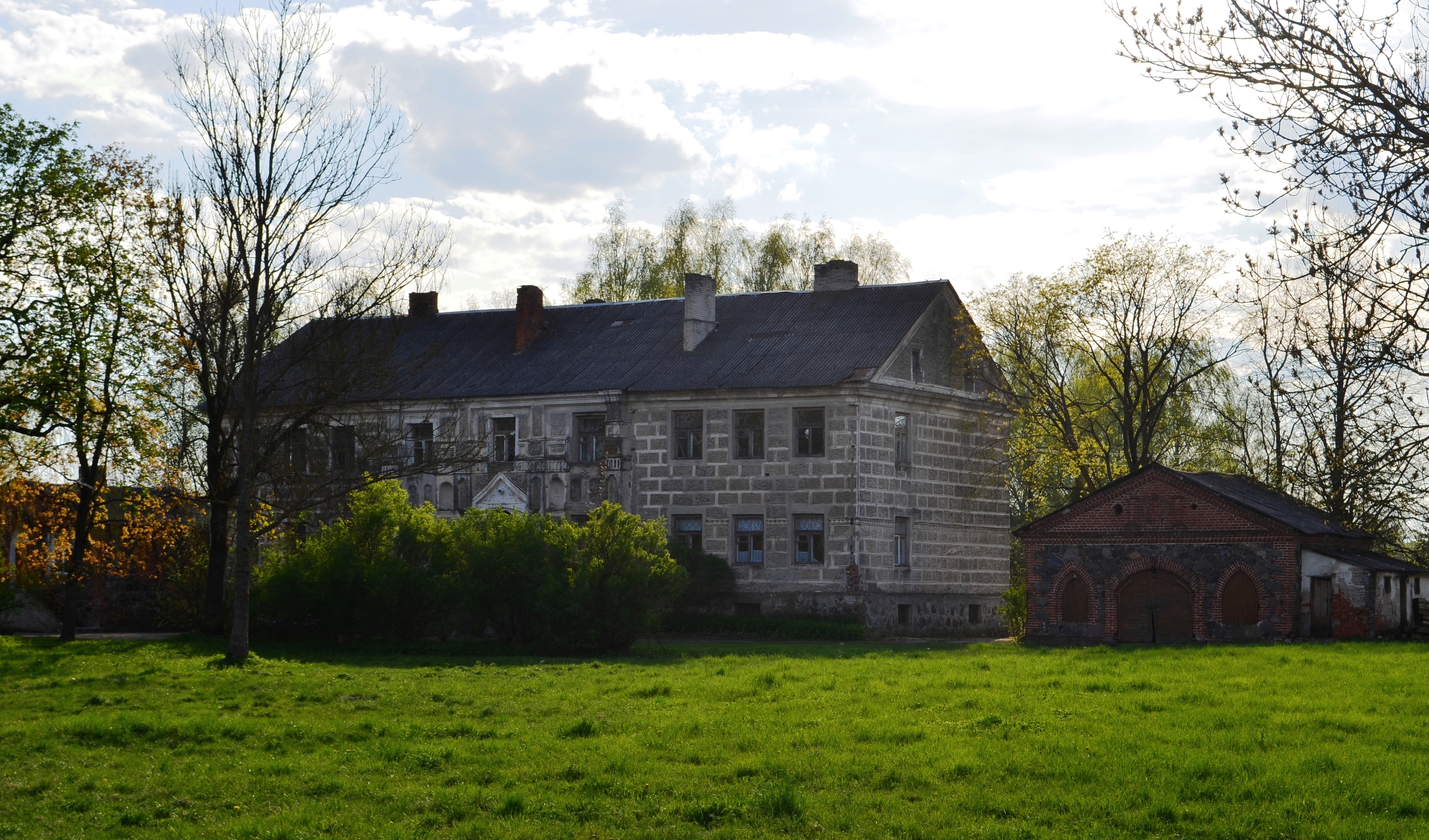 Dvaras, Stasinės k., Kėdainių raj.